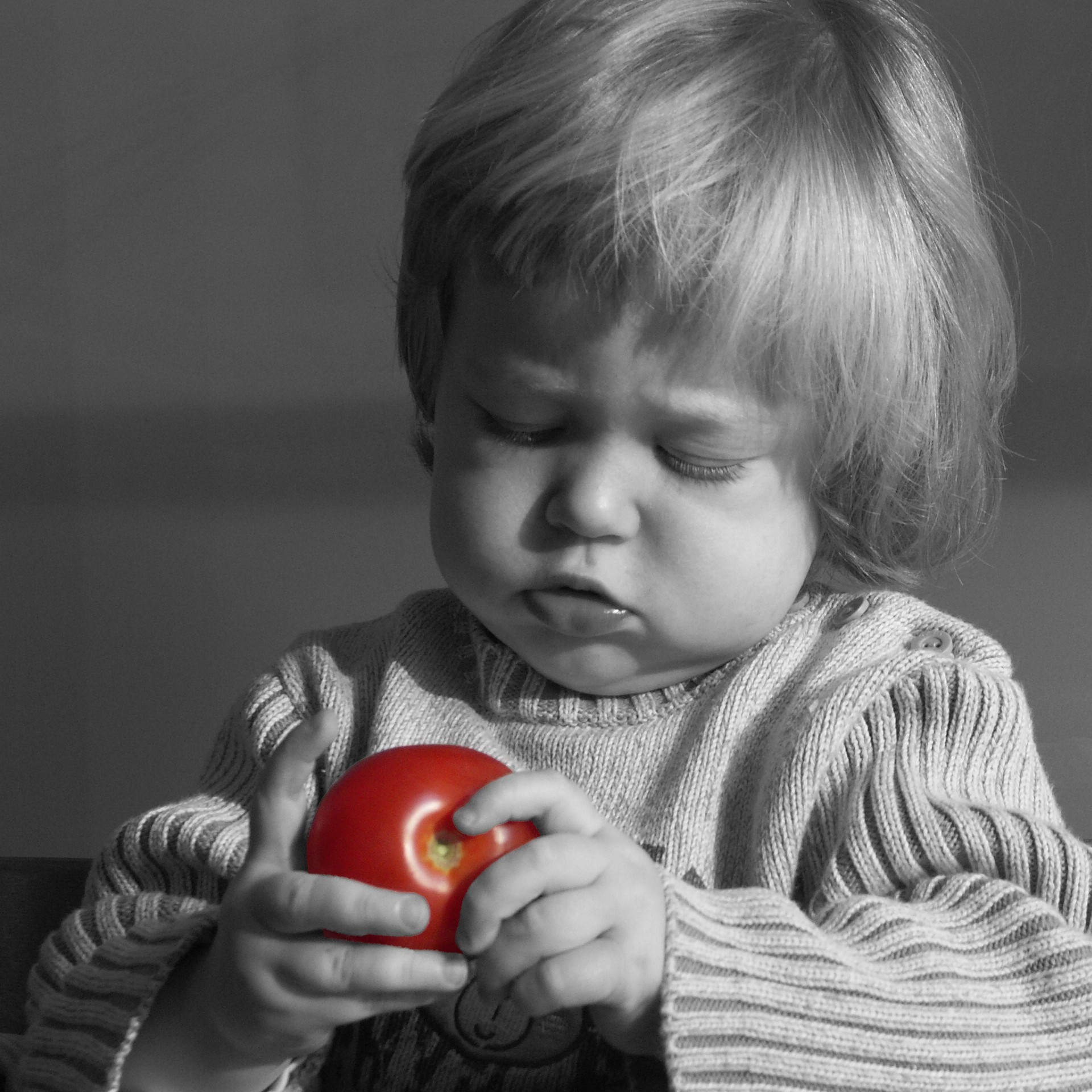 Freistellung, einer Tomate in den Händen eines Kleinkindes (16 mon.)